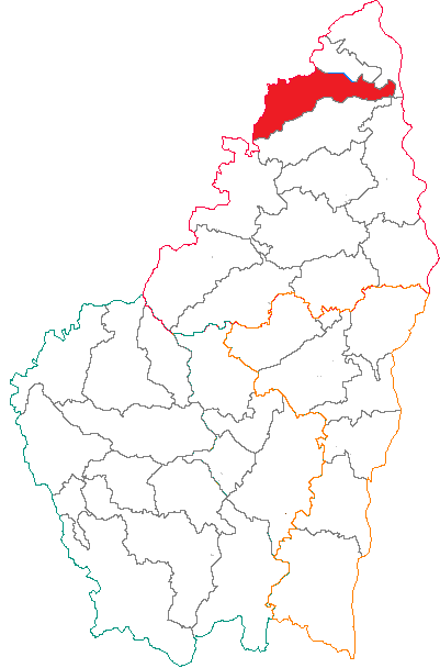 Situation du canton dans le département de l'Ardèche (France)